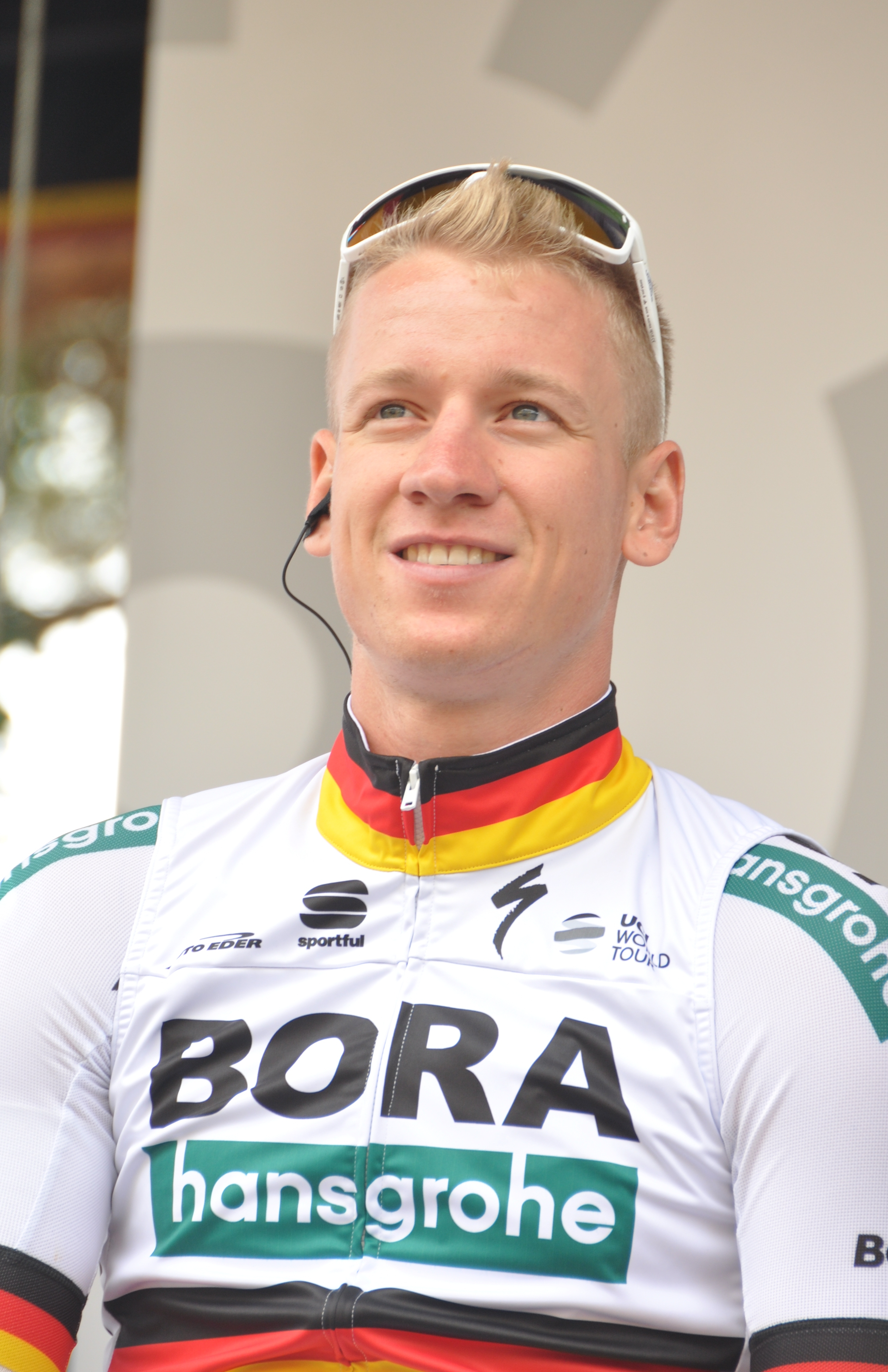 Pascal Ackermann, deutscher Radrennfahrer